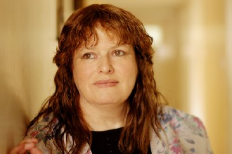 רחל נפרסטק